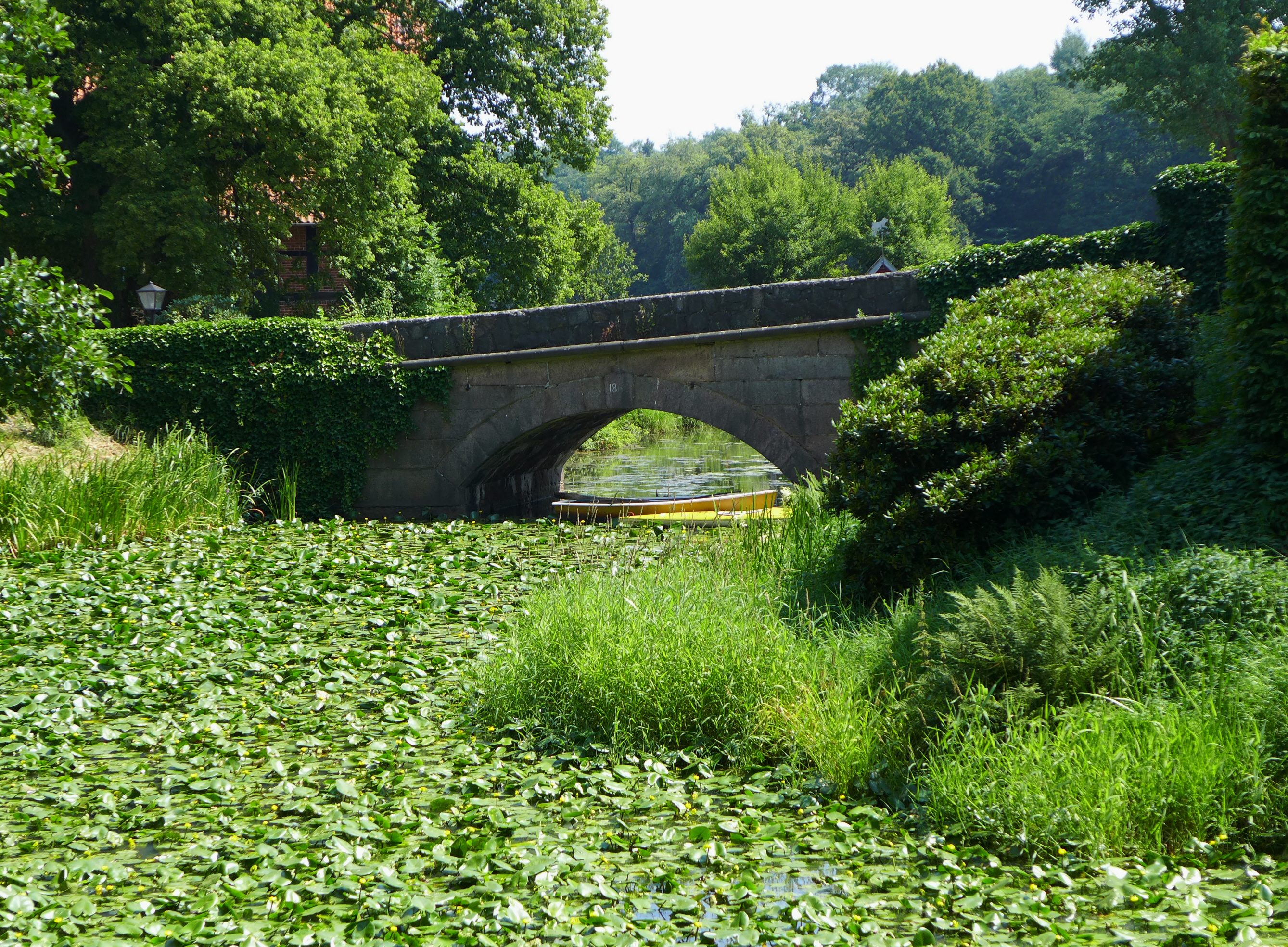 Brücke über einen Seerosenteich in Stellichte, Landkreis Heidekreis.